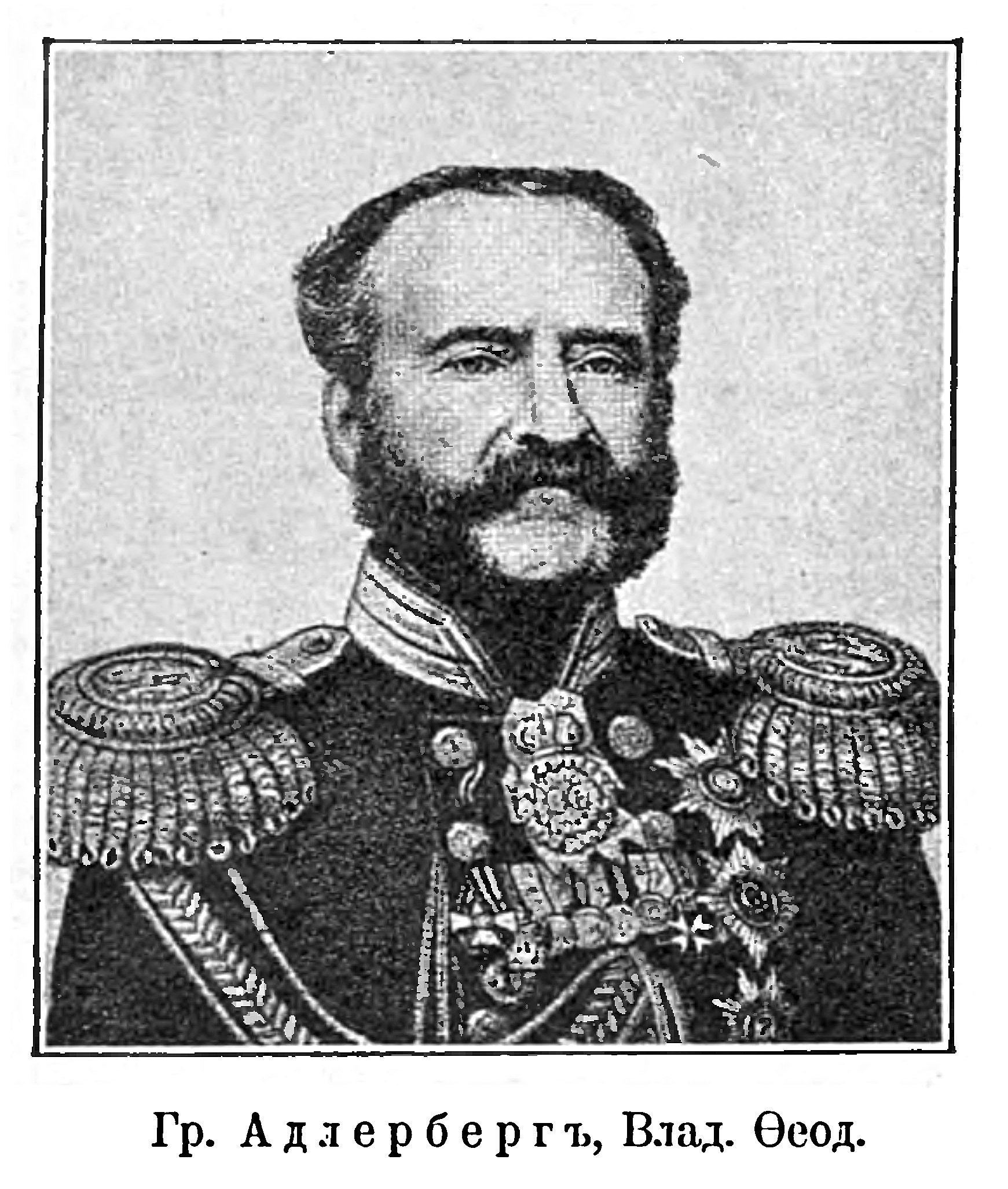 Граф Владимир Фёдорович Адлерберг 1-й (1791—1884) — приближённый Николая I, генерал от инфантерии, генерал-адъютант, в 1852-70 годах — министр двора и уделов. Брат статс-дамы Ю. Ф. Барановой: имя при рождении: Эдуард Фердинанд Вольдемар фон Адлерберг, или Эдвард Фердинанд Вольдемар Адлерберг нем.: Eduard Ferdinand Woldemar von Adlerberg швед.: Edvard Ferdinand Voldemar Adlerberg py-aнгл. pоманизатция: Graf Vladimir Fyodorovich Adleberg I